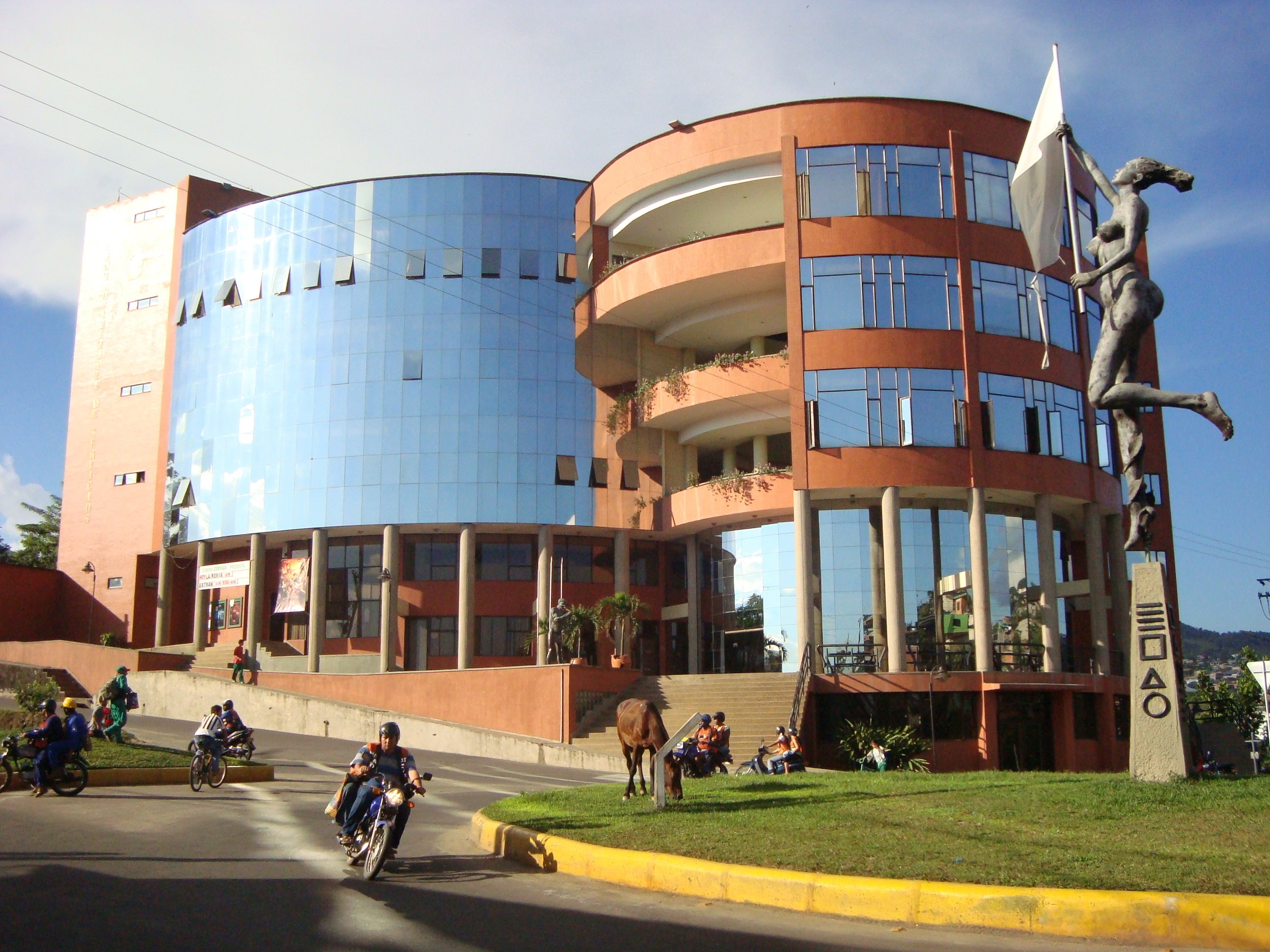 Edificio Victoria Regia, sede del Centro Múltiple de Comfaca en Florencia, Caquetá